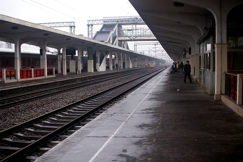 Suzhou Station Platform,蘇州駅ホーム, 正直、もっときれいと言いますか、蘇州の雰囲気が漂う駅だと思ってました。 苏州火车站站台